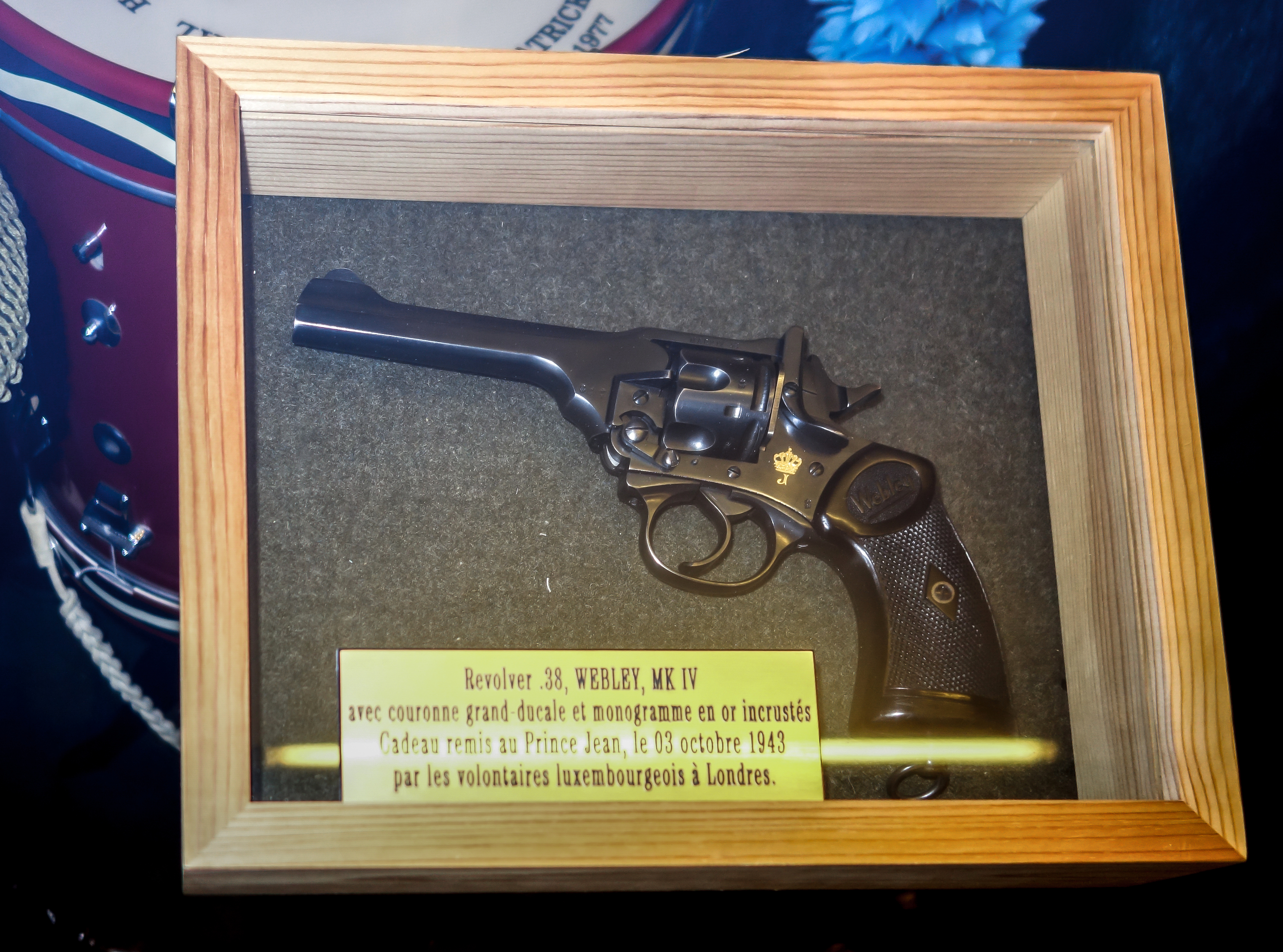 Luxembourg 2015